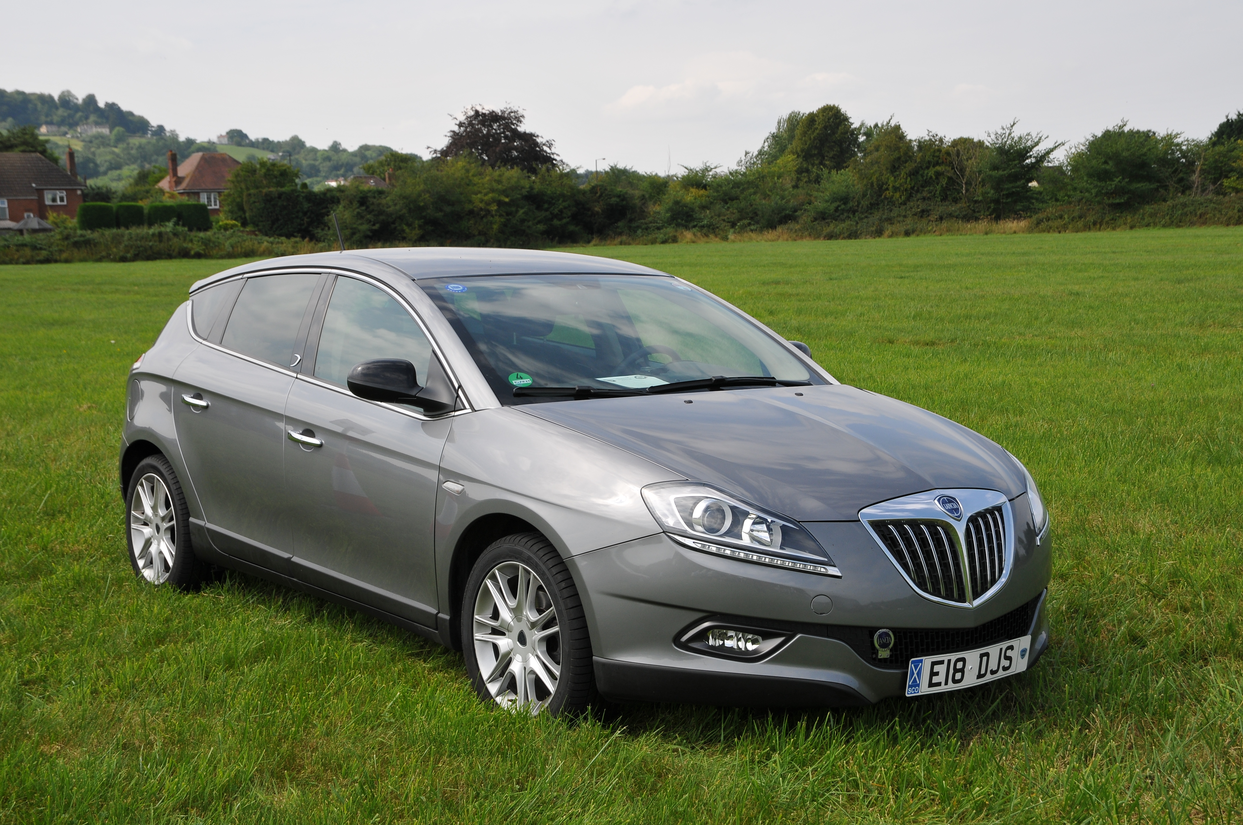 Lancia Motor Club AGM 2011